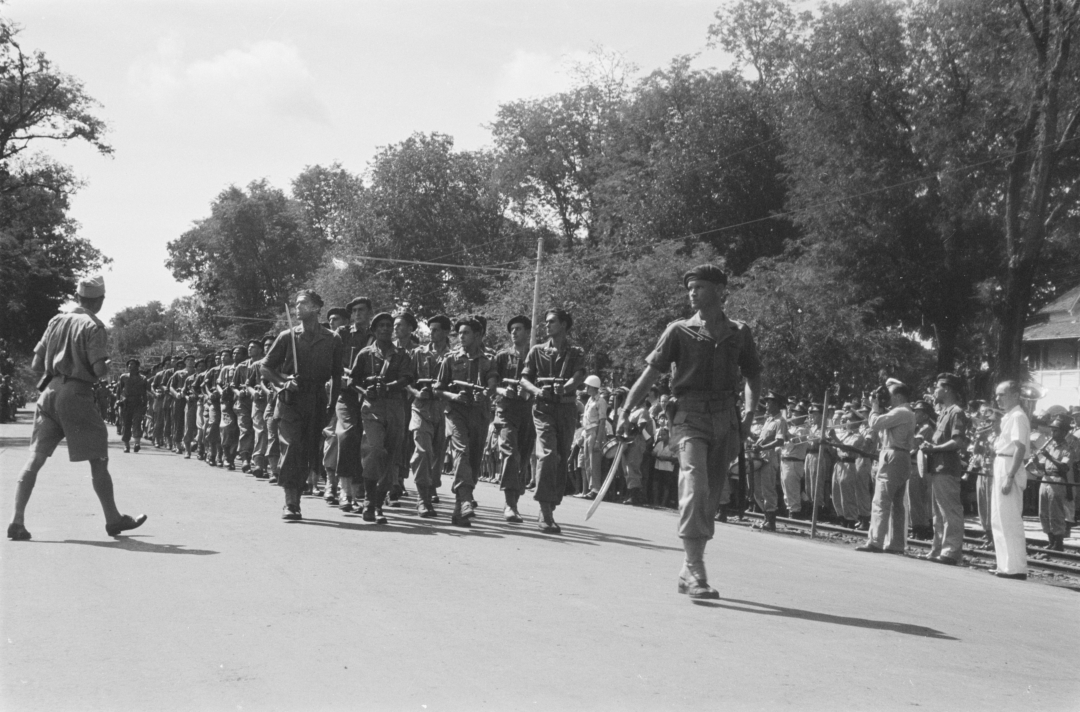 Collectie / Archief : Fotocollectie Dienst voor Legercontacten Indonesië Reportage / Serie : [DLC] Parade t.g.v. verjaardag van Prinses Juliana Beschrijving : Parachutisten (Korps Speciale Troepen) Annotatie : Bijnaam de Turco's. Voorop kapitein Raymond Westerling Datum : 30 april 1947 Locatie : Batavia, Indonesië, Jakarta, Nederlands-Indië Fotograaf : Fotograaf Onbekend / DLC Auteursrechthebbende : Nationaal Archief Materiaalsoort : Negatief (zwart/wit) Nummer archiefinventaris : bekijk toegang 2.24.04.03 Bestanddeelnummer : 204-6-3